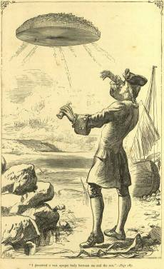 Viagens de Gulliver, Parte III, Capítulo I